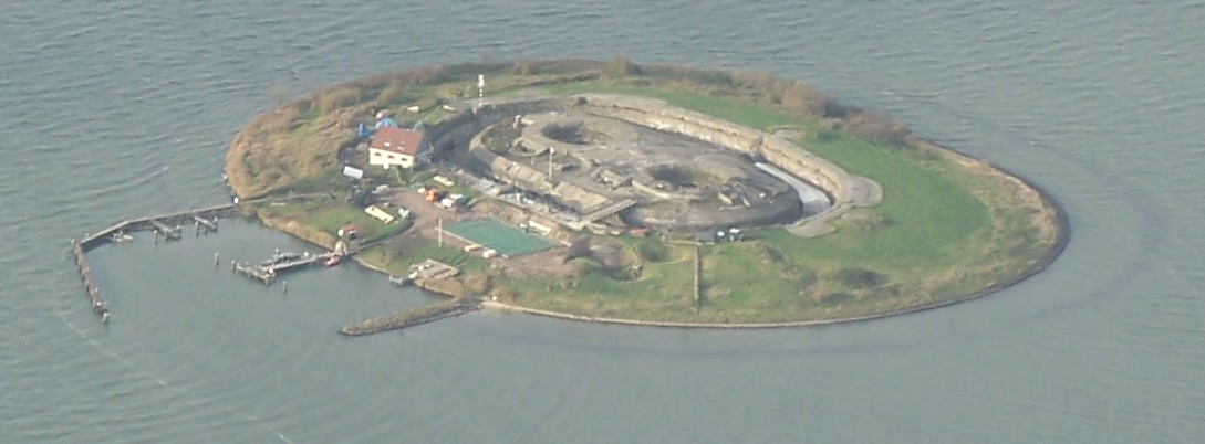 Pampus Pampus